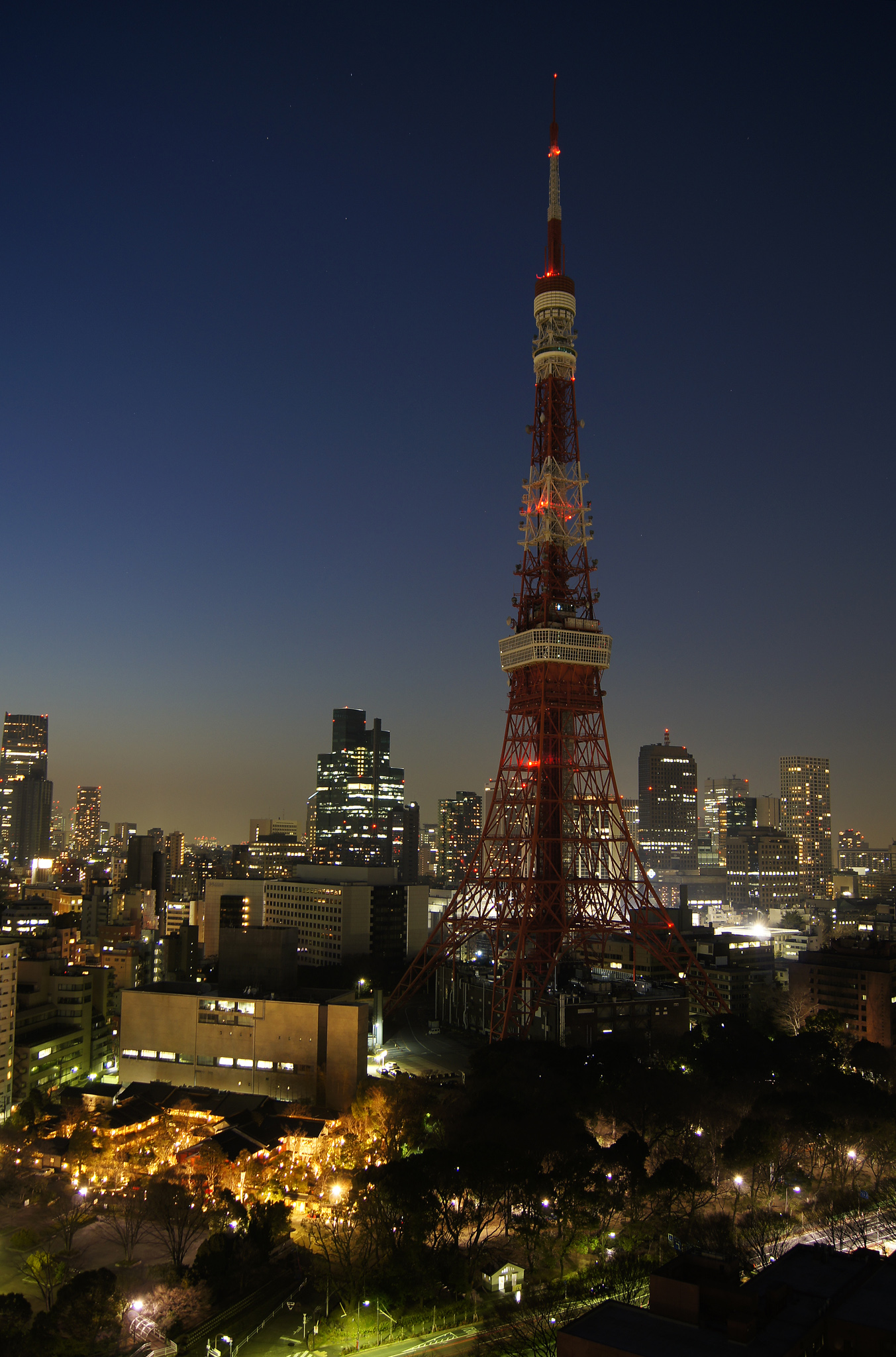 2011.3.11(金)の東北地方太平洋沖地震にて電力不足となったため、ライトアップを中止し節電に協力する東京タワー。ザ・プリンスパークタワー東京より撮影。